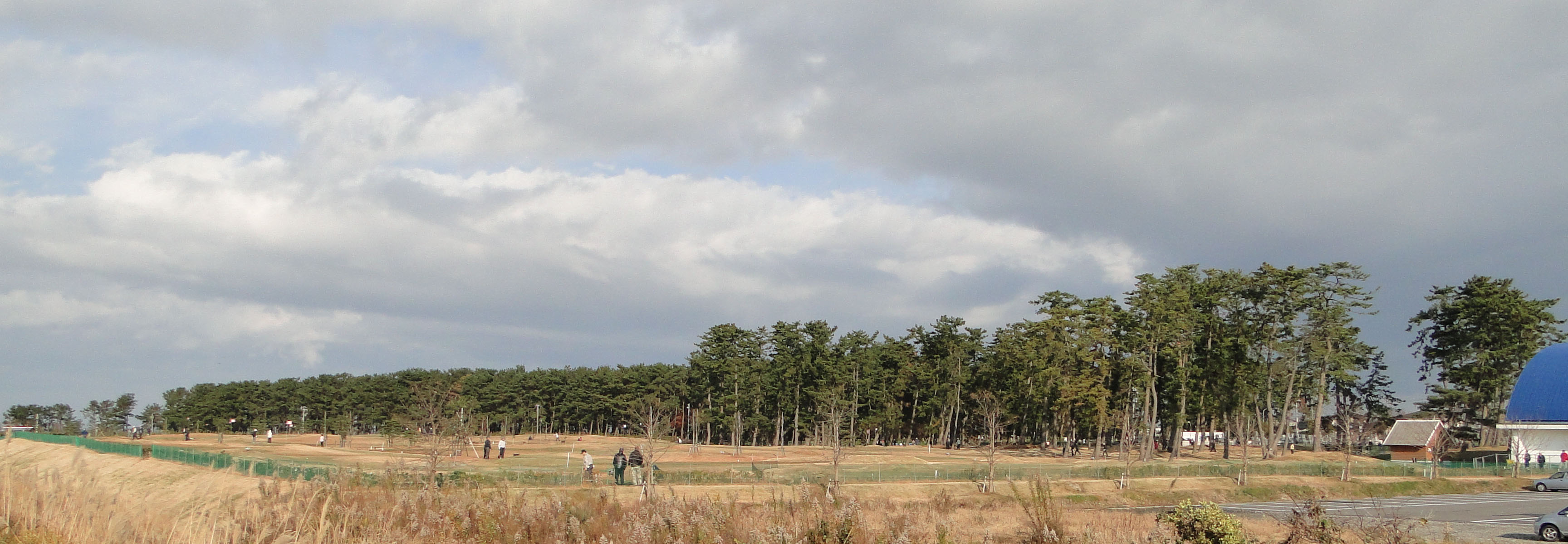 布施川右岸堤より、おおしまパークゴルフ場。